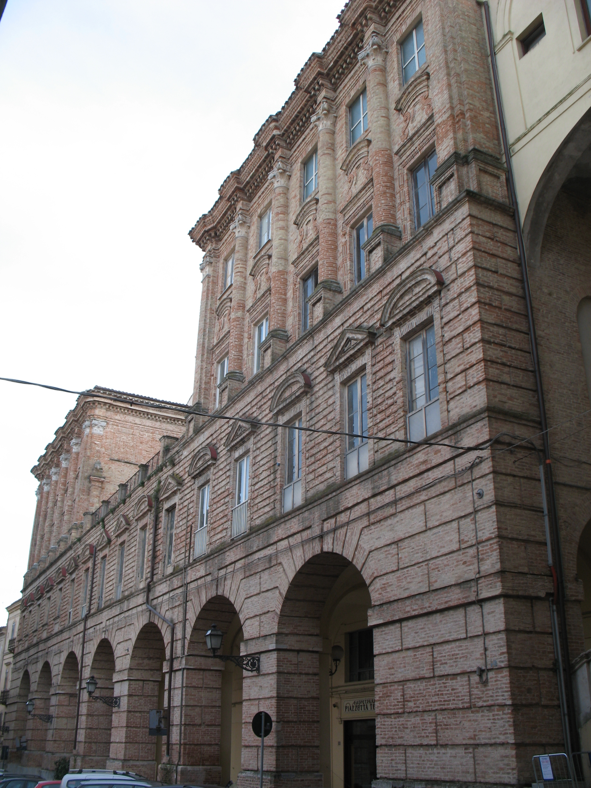 Il Seminario Diocesano di Chieti fu fondato durante il Concilio di Trento da mons. Oliva.